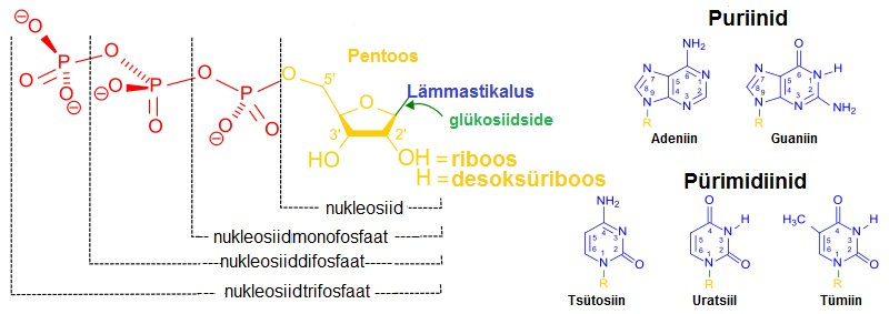 Nukleotiid, nukleosiid, lämmastikalused